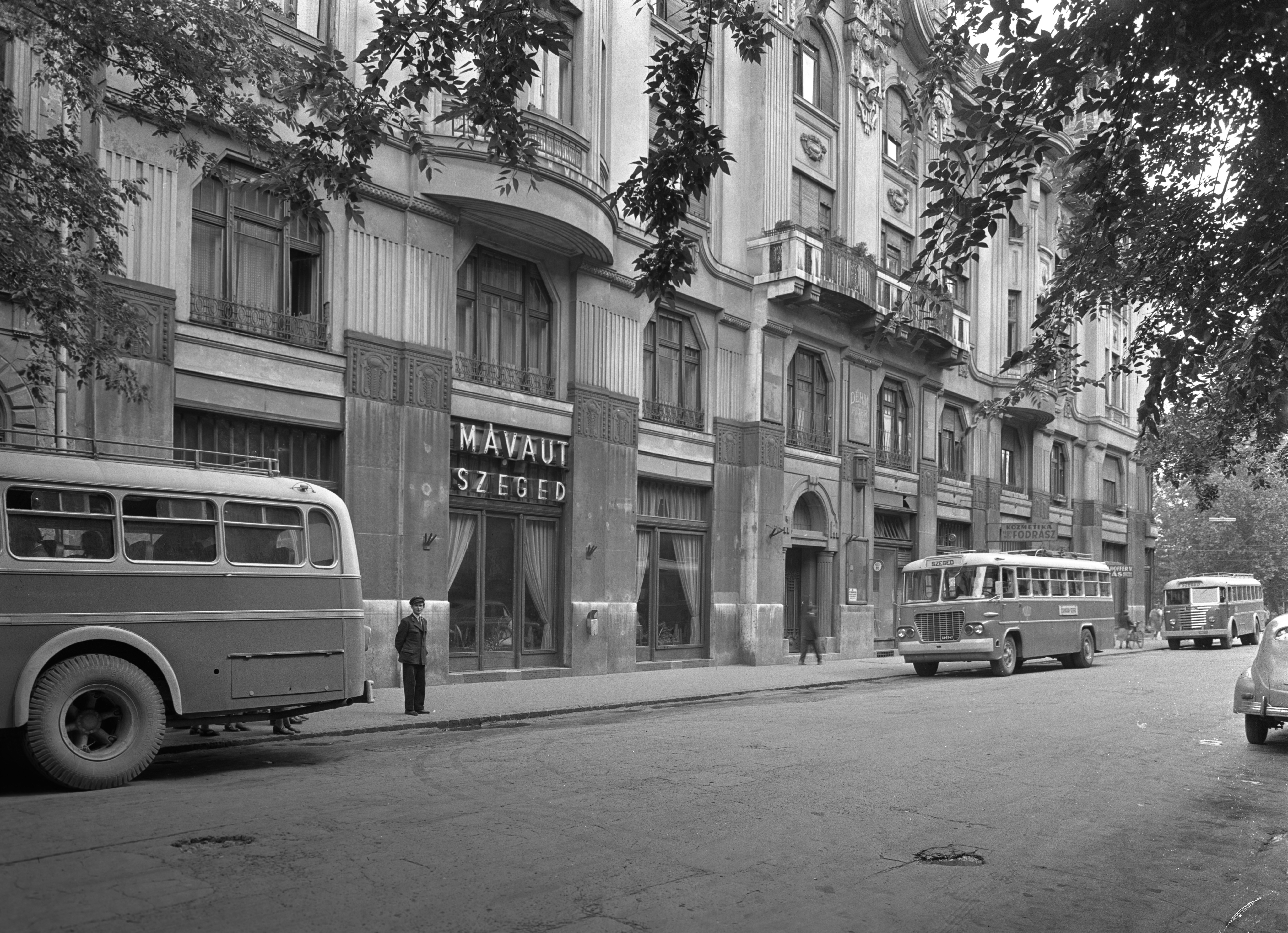 Takaréktár utca, autóbusz-állomás. Location: Hungary, Szeged Tags: Ikarus-brand, MÁVAUT-organisation, bus, Hungarian brand, bus stop, bus stop Title: Takaréktár utca, autóbusz-állomás.